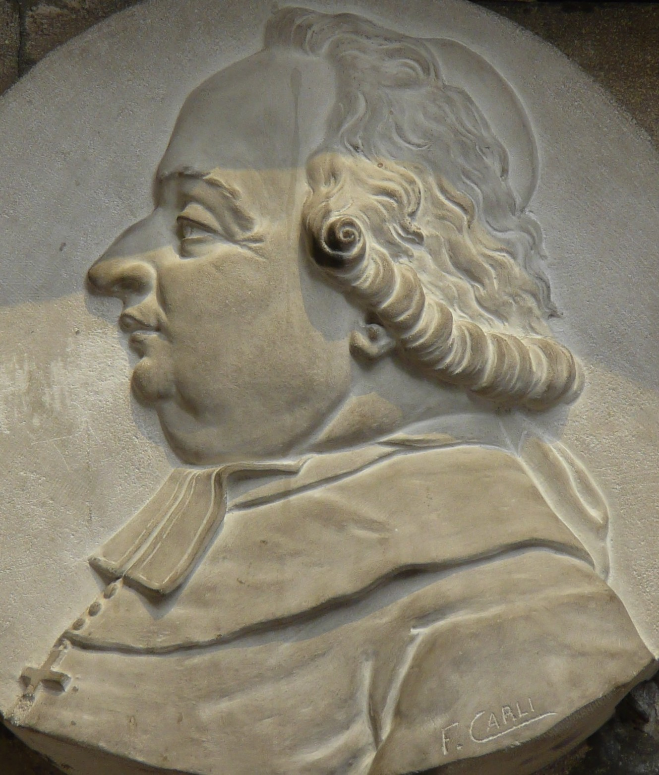 Arles (Bouches-du-Rhône, France), primatiale St Trophime, bas-relief en marbre en forme de médaillon, représentant le profil de Jean-Marie du Lau signé François Carli.